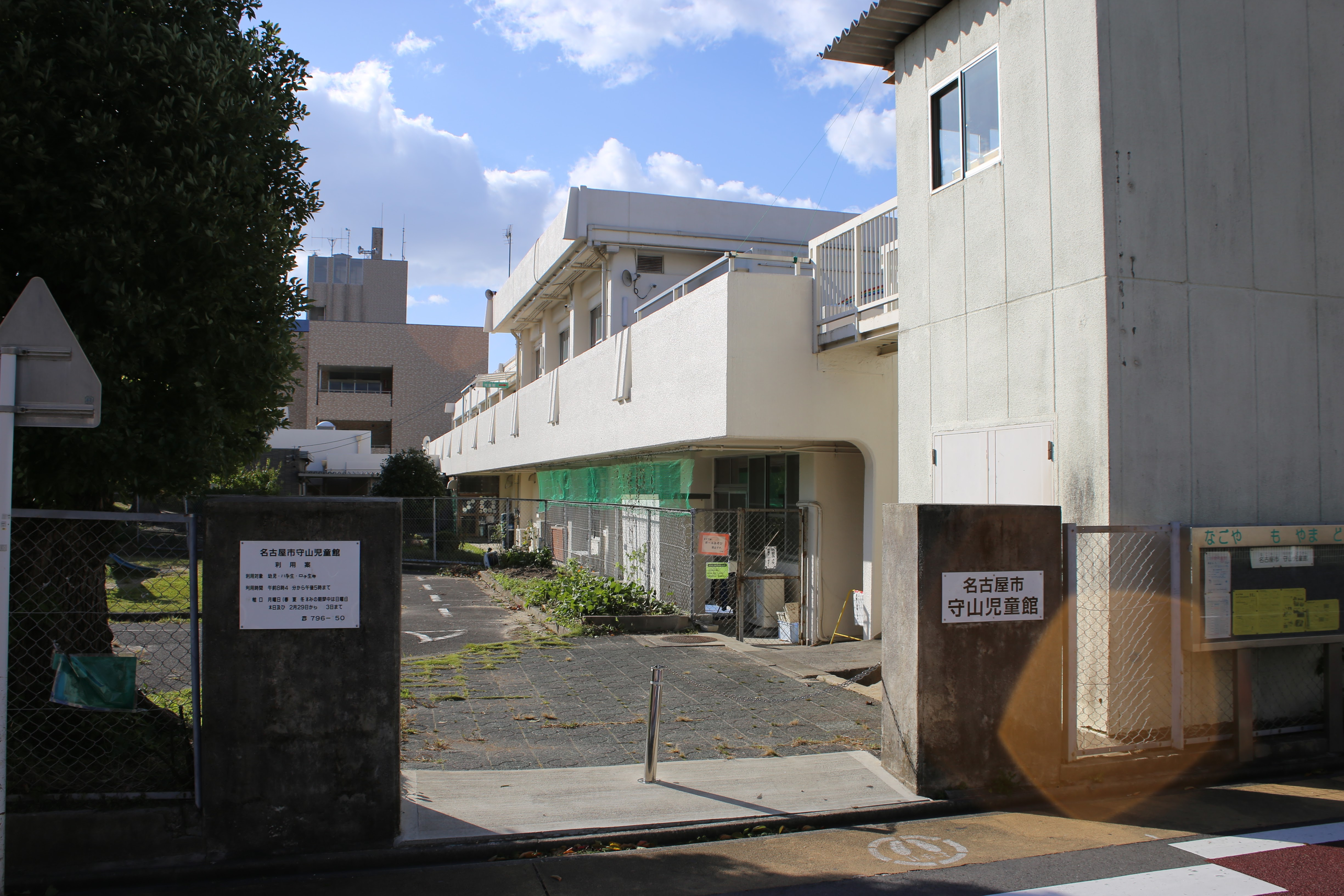 名古屋市守山区小幡一丁目 名古屋市守山児童館